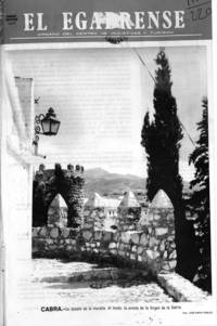 Publicación periódica local de Cabra (Córdoba). España